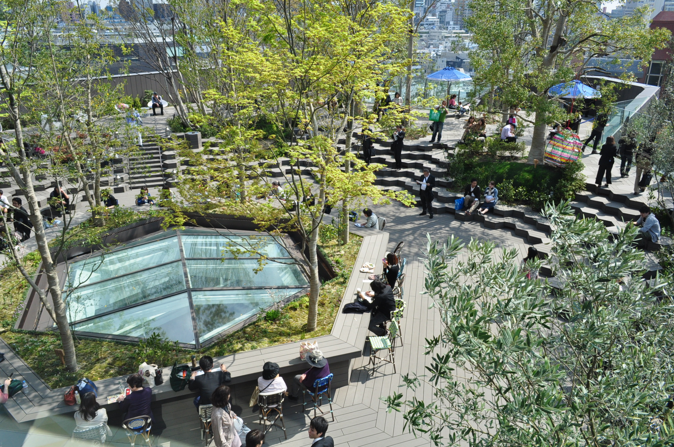 東急プラザ表参道原宿の億重庭園